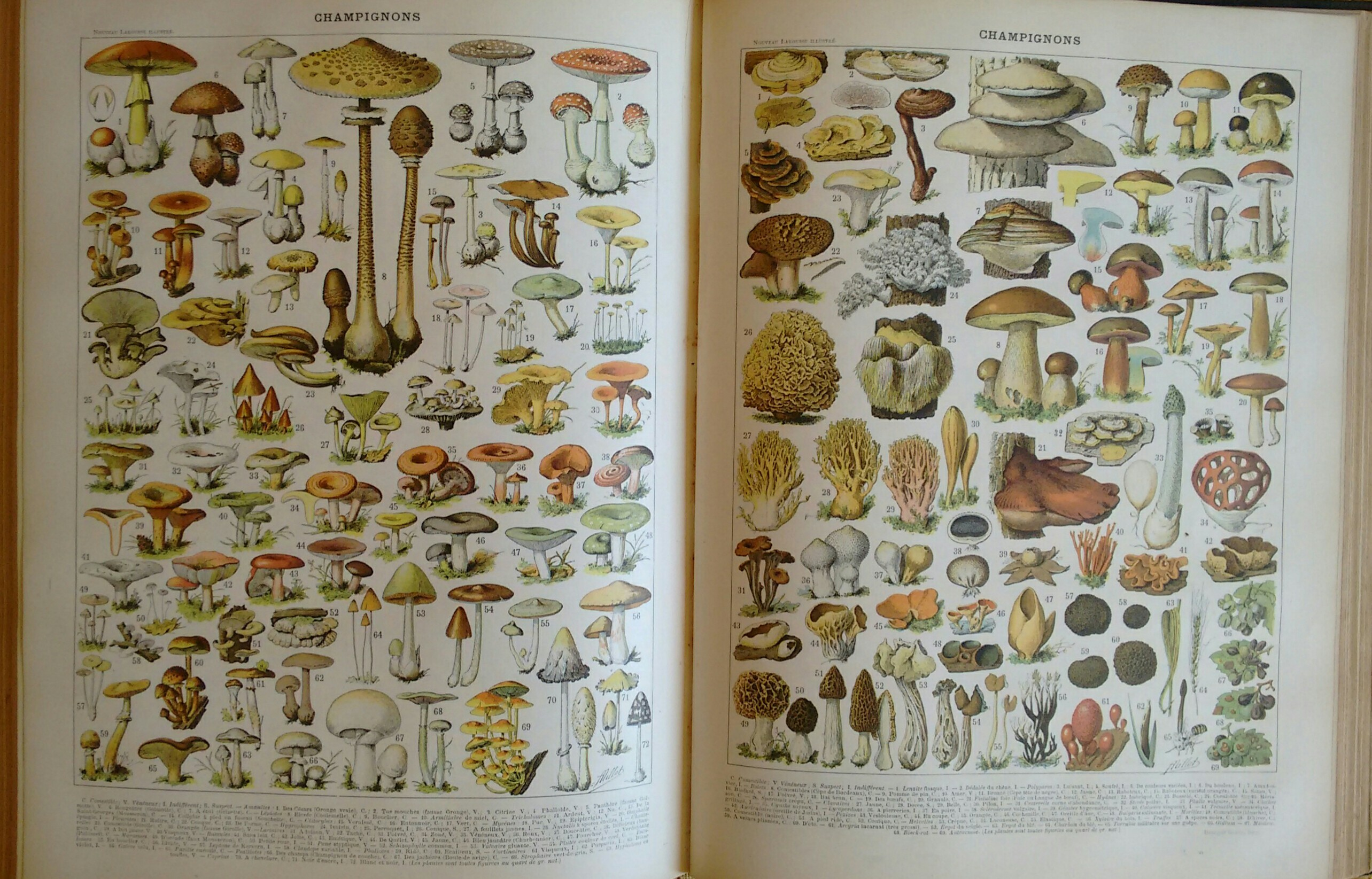 Nouveau Larousse illustré - Claude Augé - planche champignons